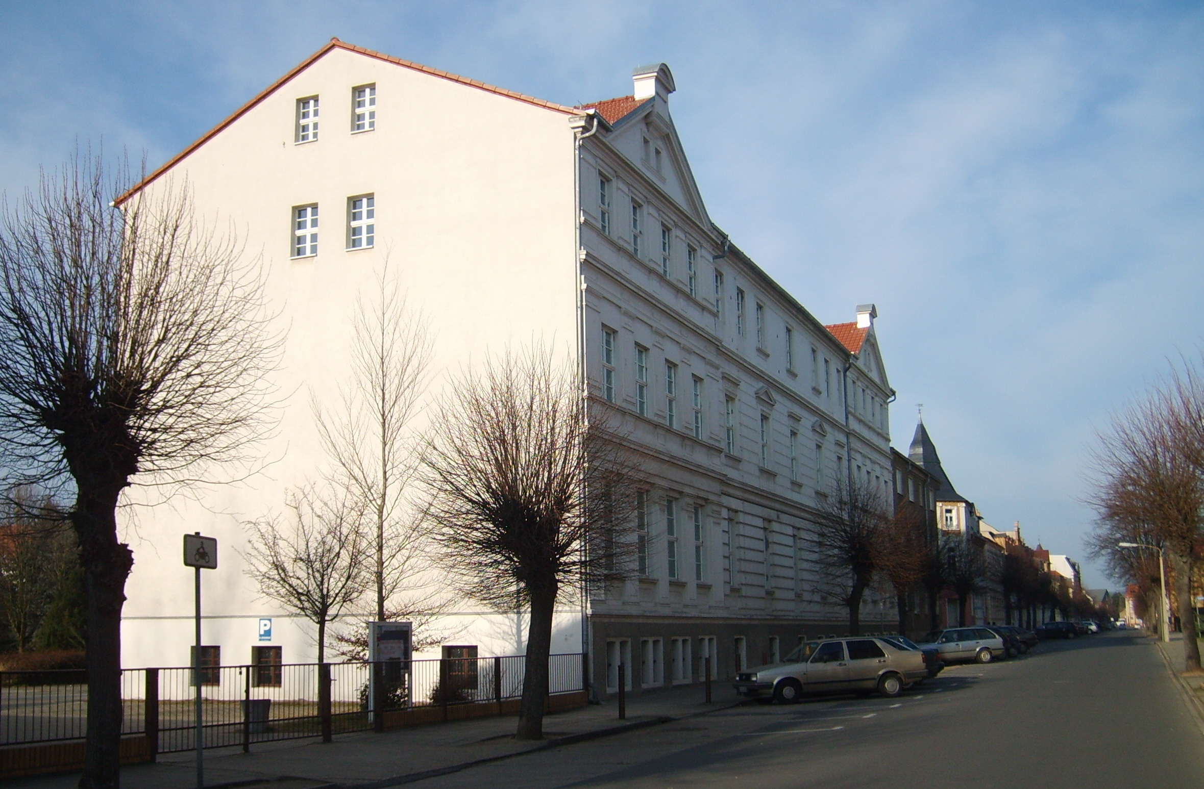 Ehemalige Präparandenanstalt in Elsterwerda